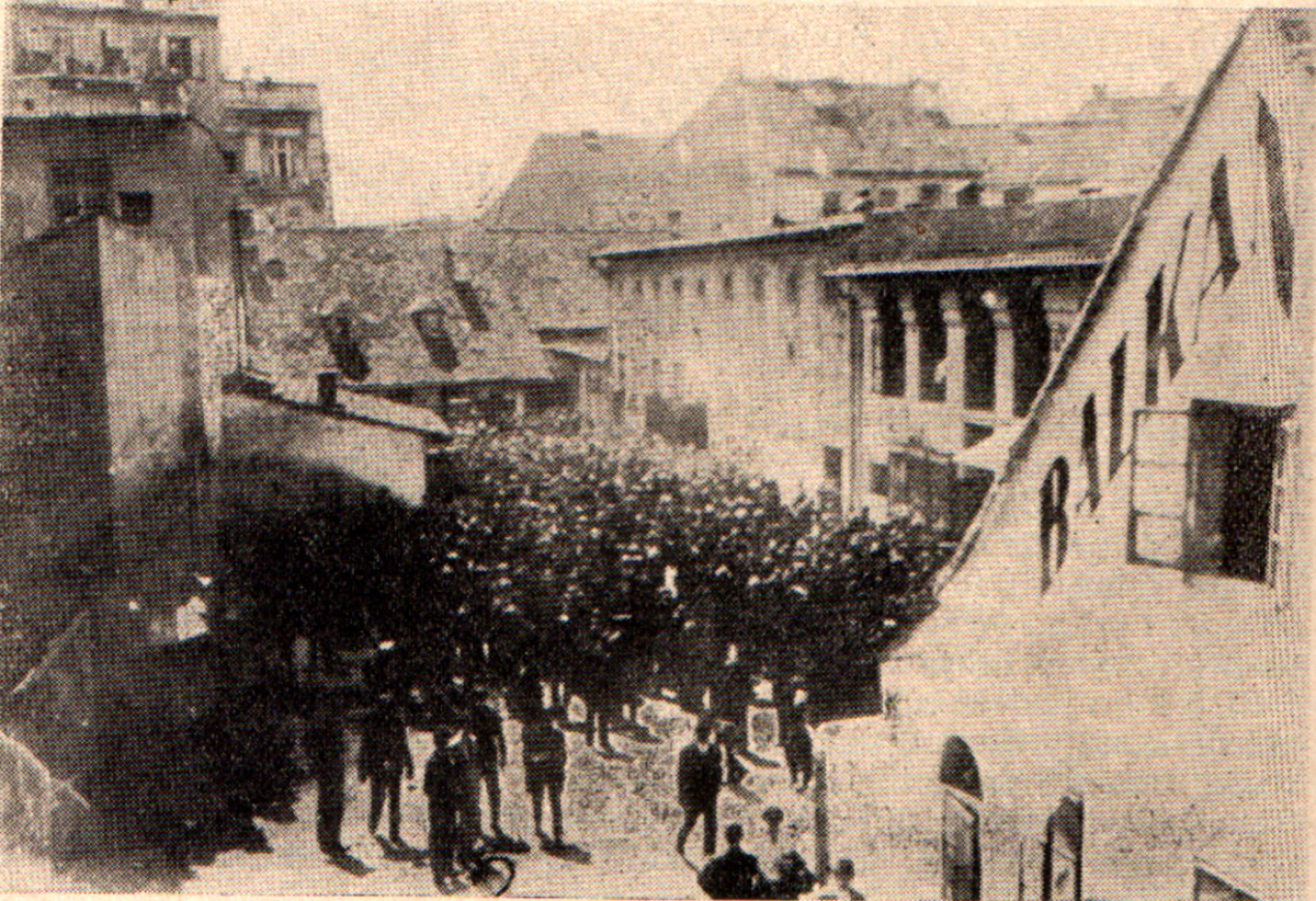 Srpskohrvatski / српскохрватски: Članovi NRPJ i nezavisnih sindikata pred kinom Balkan u Zagrebu, na proslavi 1. maja 1924. godine.